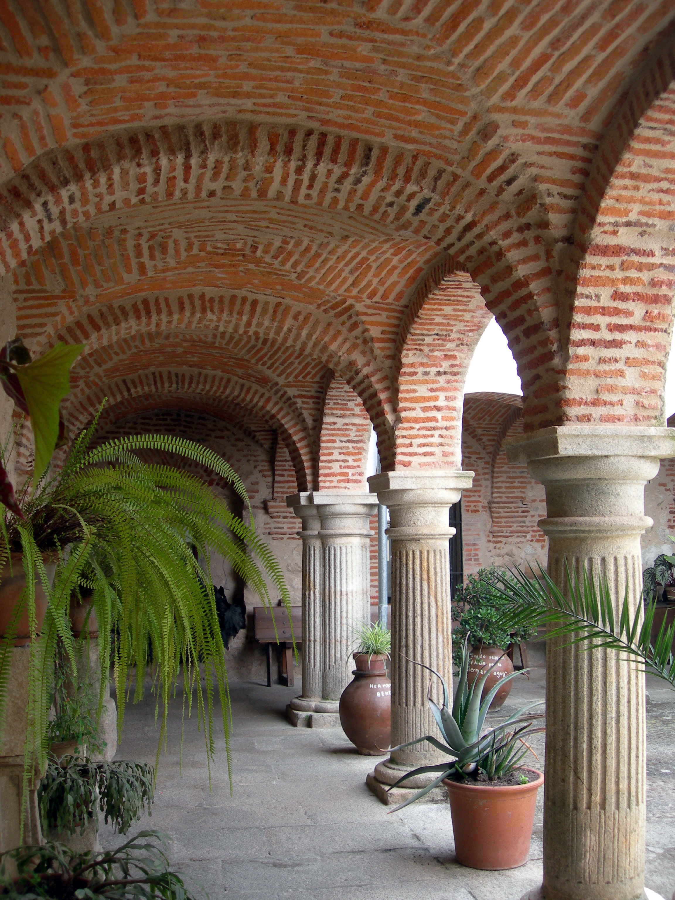 Vista del Clautro del convento El Palancar